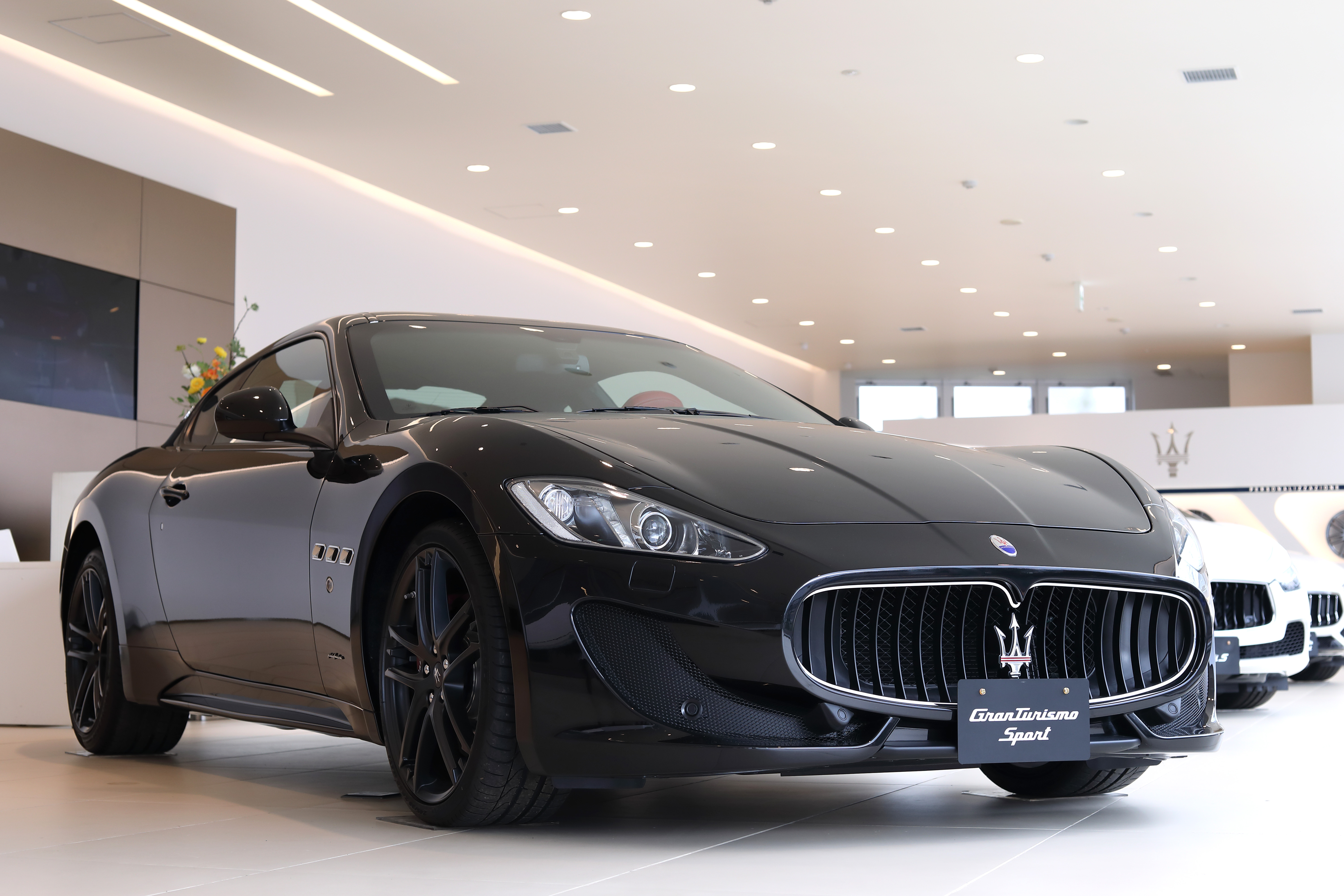 ja